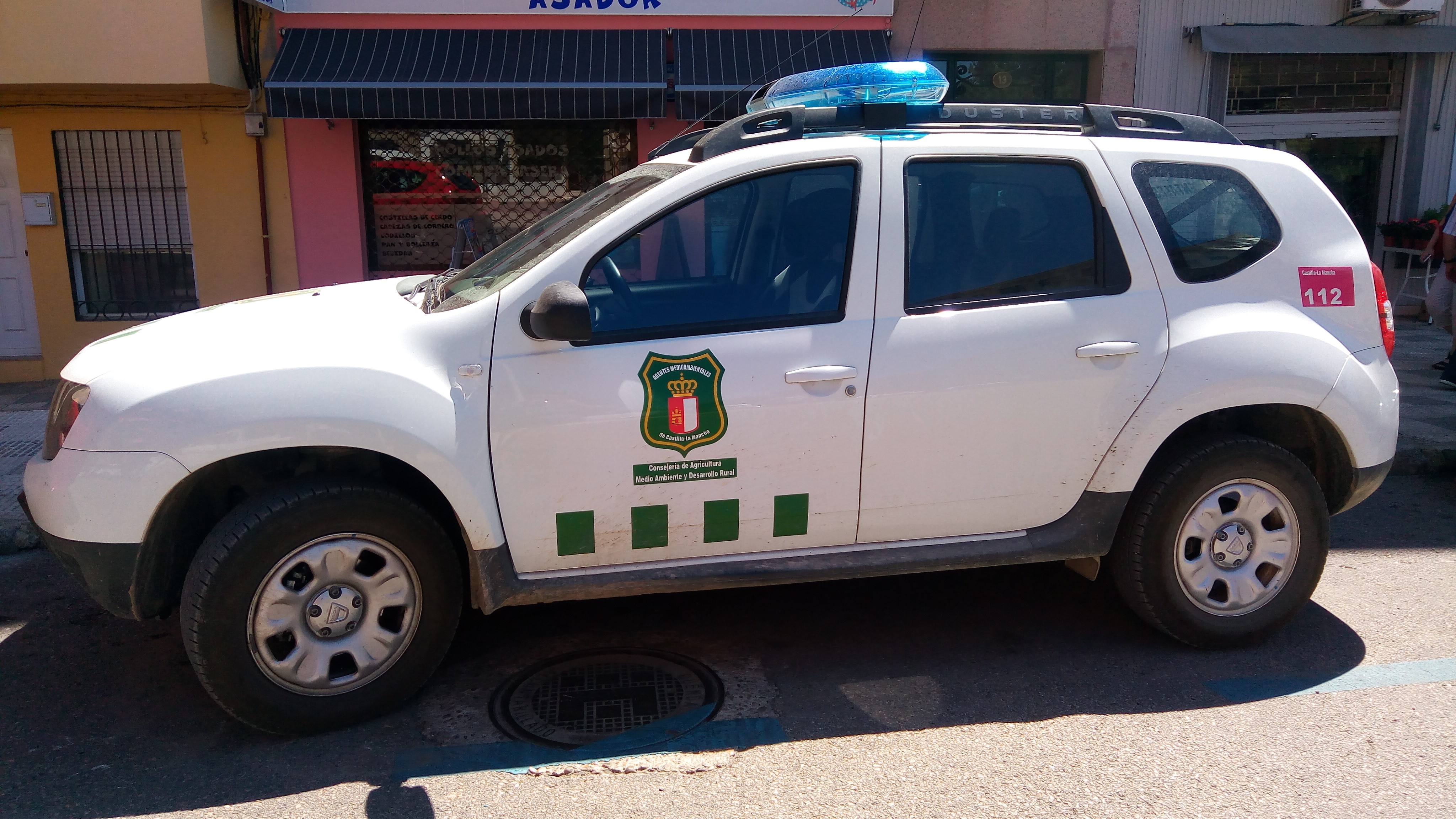 Vehículo de los Agentes de Medio Ambiente de Castilla-La Mancha.